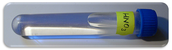 Kyselina dusičná - HNO3